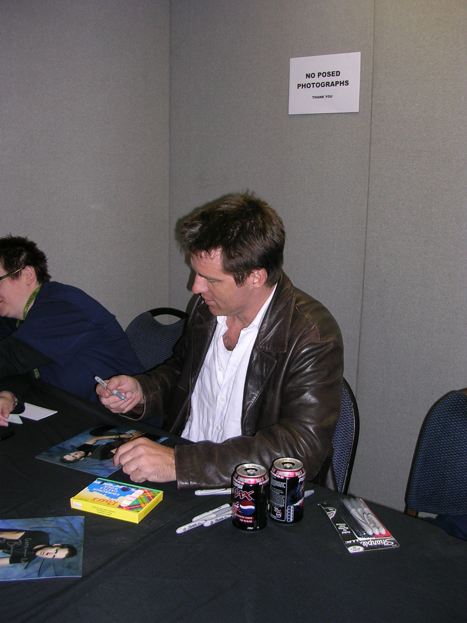 Collectormania 15 in Milton Keynes